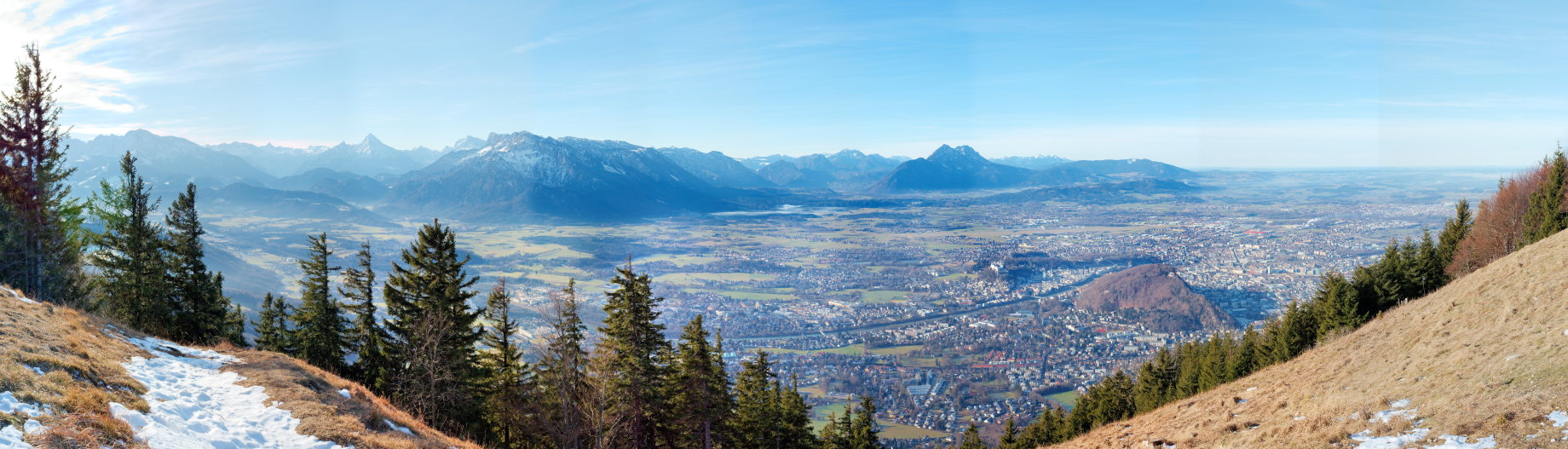 Panorama von Salzburg vom Gaisberg aus